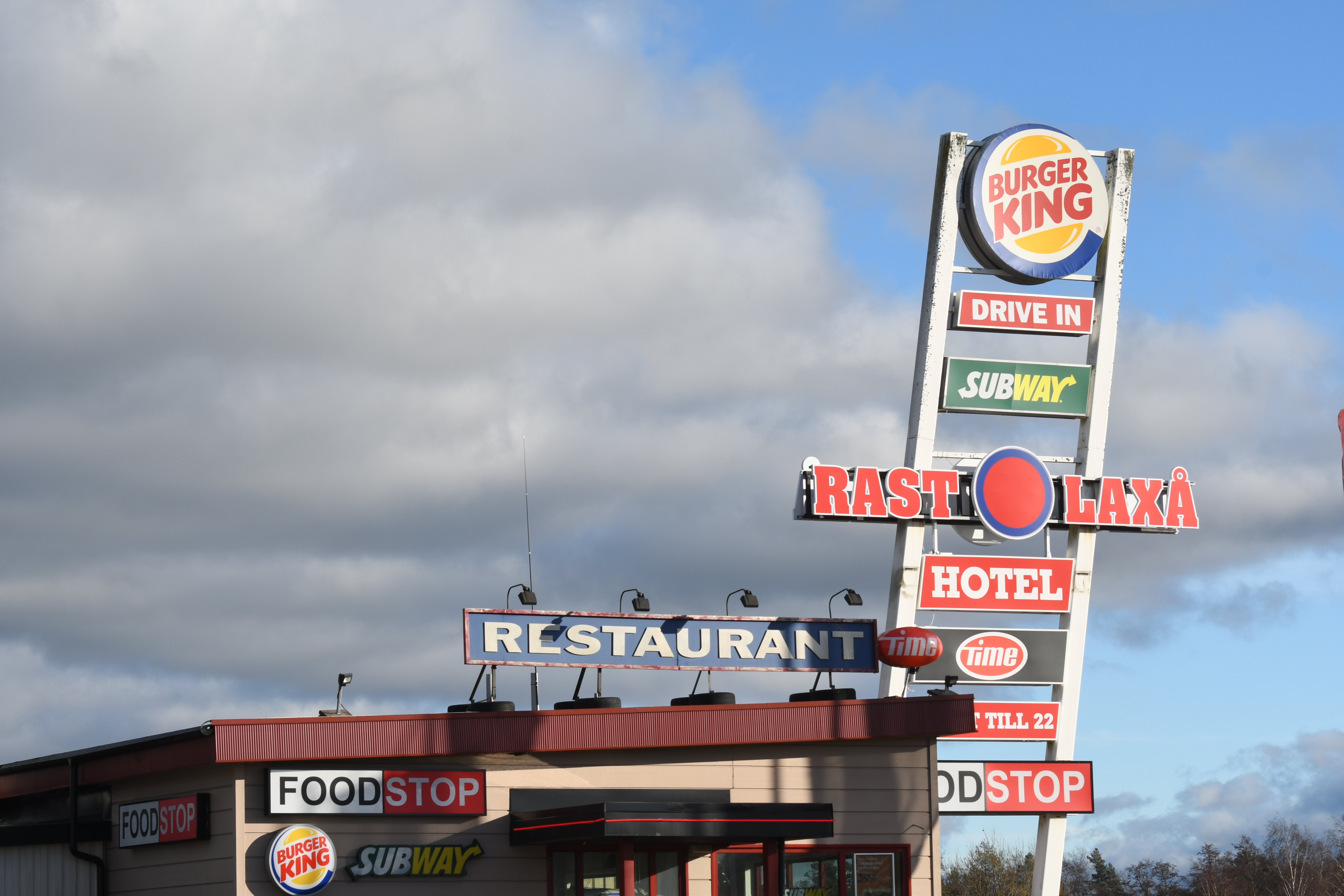 RastPunkt Laxå, november 2018.